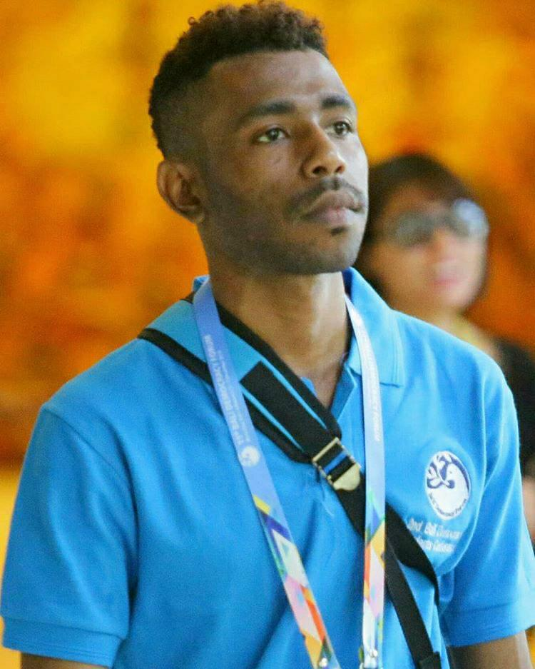 Yohanes saat menjadi delegasi di Bali Democracy Student Conference mewakili Papua